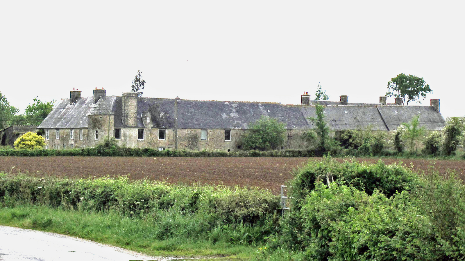 Huberville, Manche